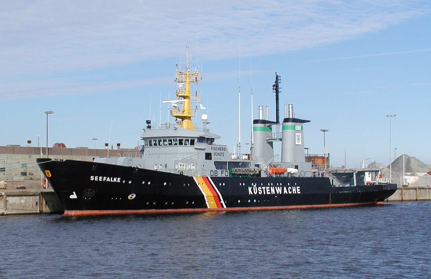 Das Schiff "Seefalke" der Küstenwache IMO Number: 7928677 MMSI Number: 211203330 Callsign: DBFO Length: 83m Beam: 13m